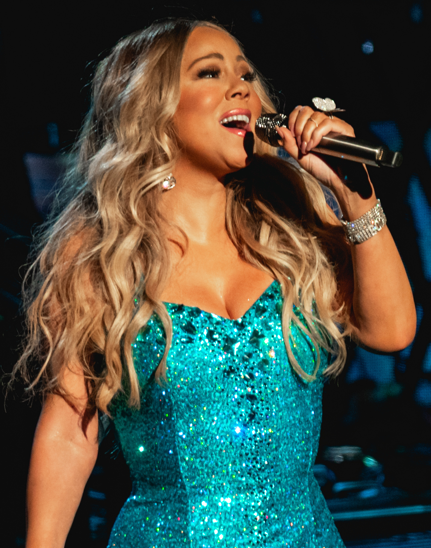 MariahRAH270519-51